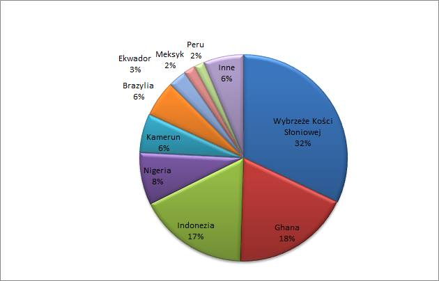 Procentowy udział w zbiorze kakaowca w 2015r.